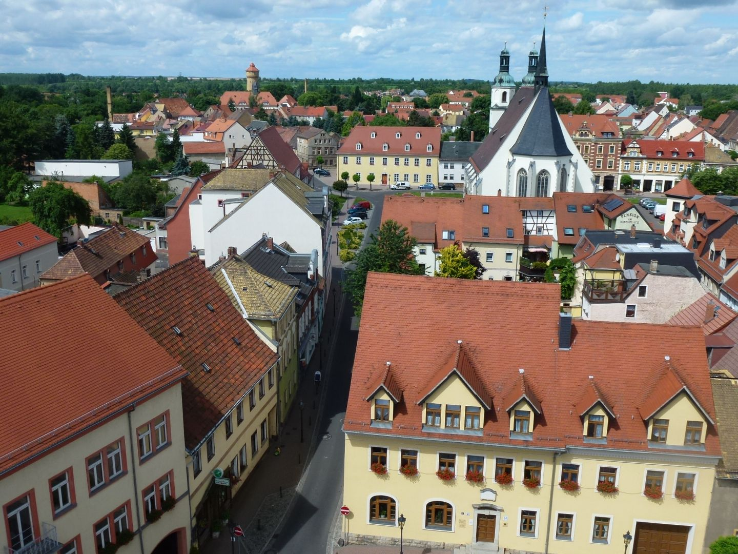 Blick vom Pegauer Rathausturm auf die Altstadt von Pegau - Denkmalschutzgebiet Kernstadt Pegau mit Rathausturm, Stadtkirche und Amtsgericht sowie Kirchplatz und Markt